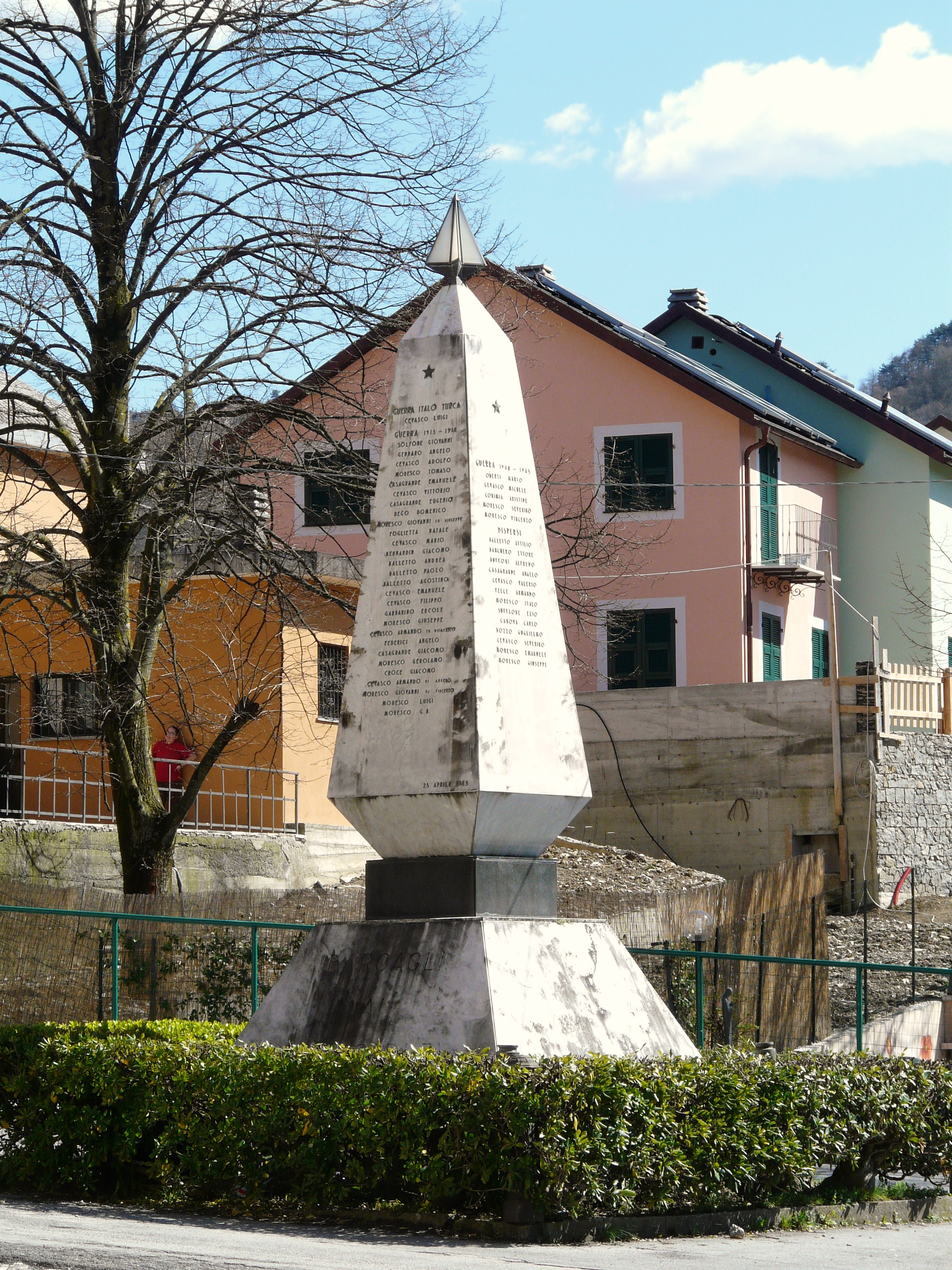 Monumento ai caduti di Bargagli, Liguria, Italia